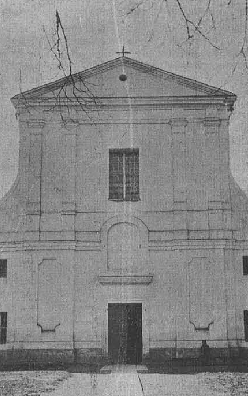 Капуцинський костел в Устилузі.